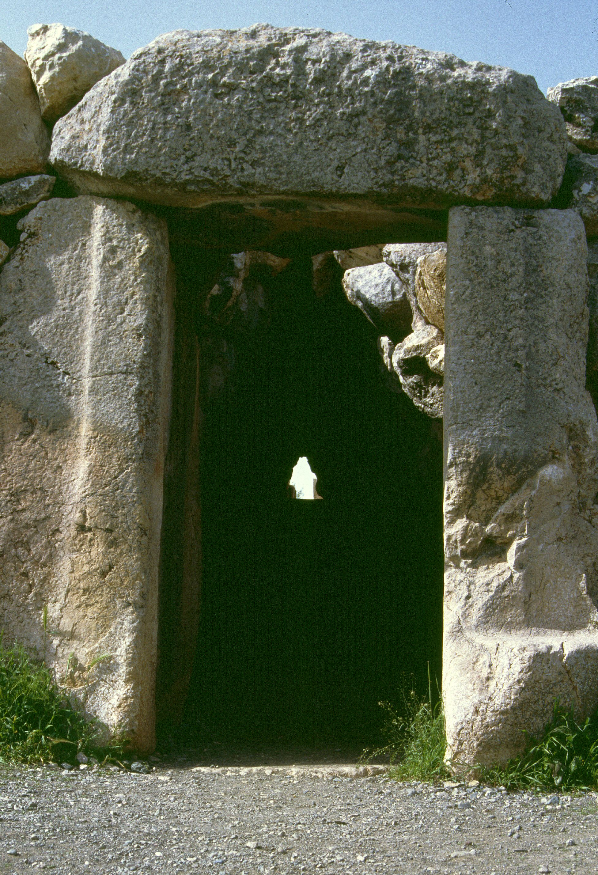 Hattusa: Yerkapi